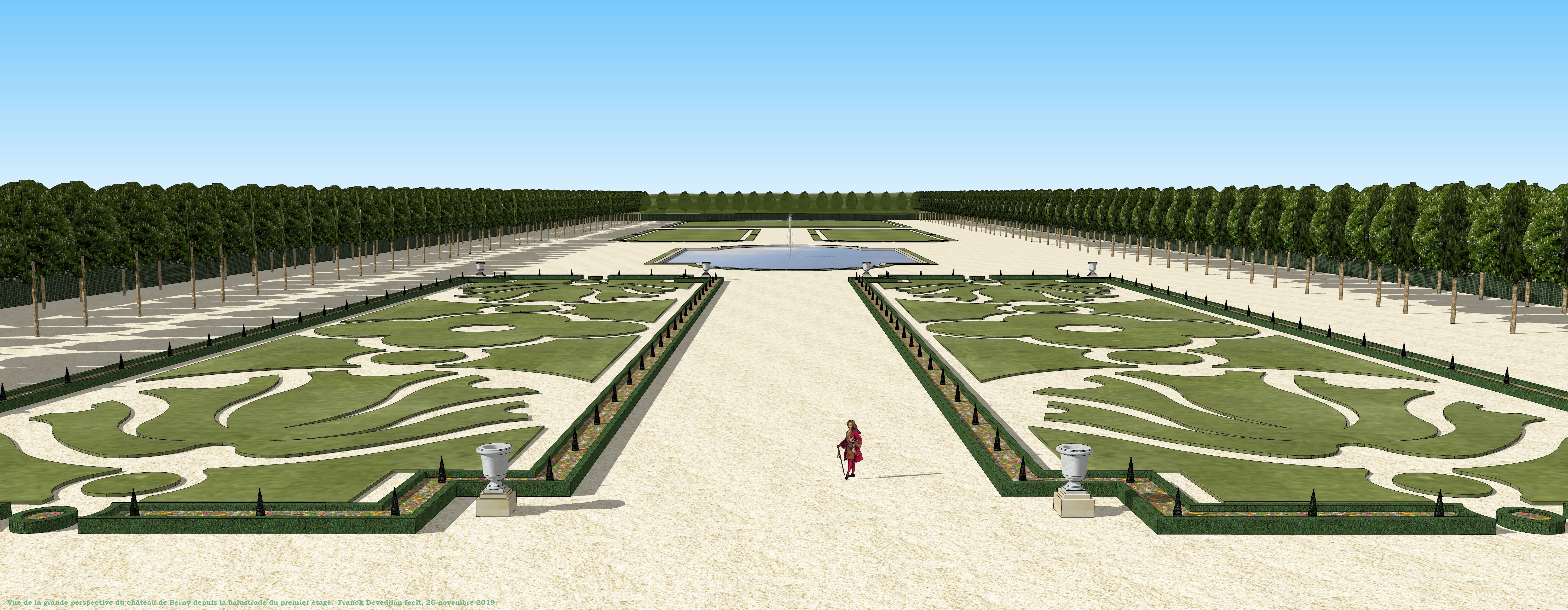 Vue du grand parterre du château de Berny vers 1700